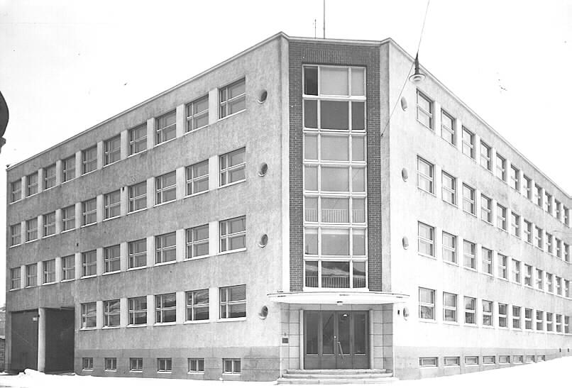 Star_kuvaaja tuntematon